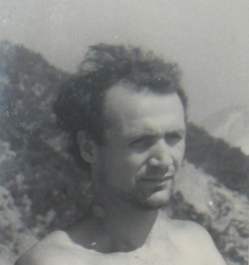 Сердюк Вадим Дмитрович